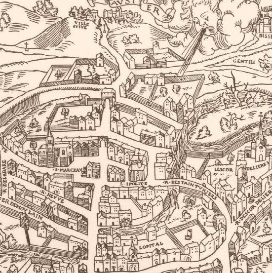 La Bièvre depuis Saint Marcel jusqu'à à Gentilly